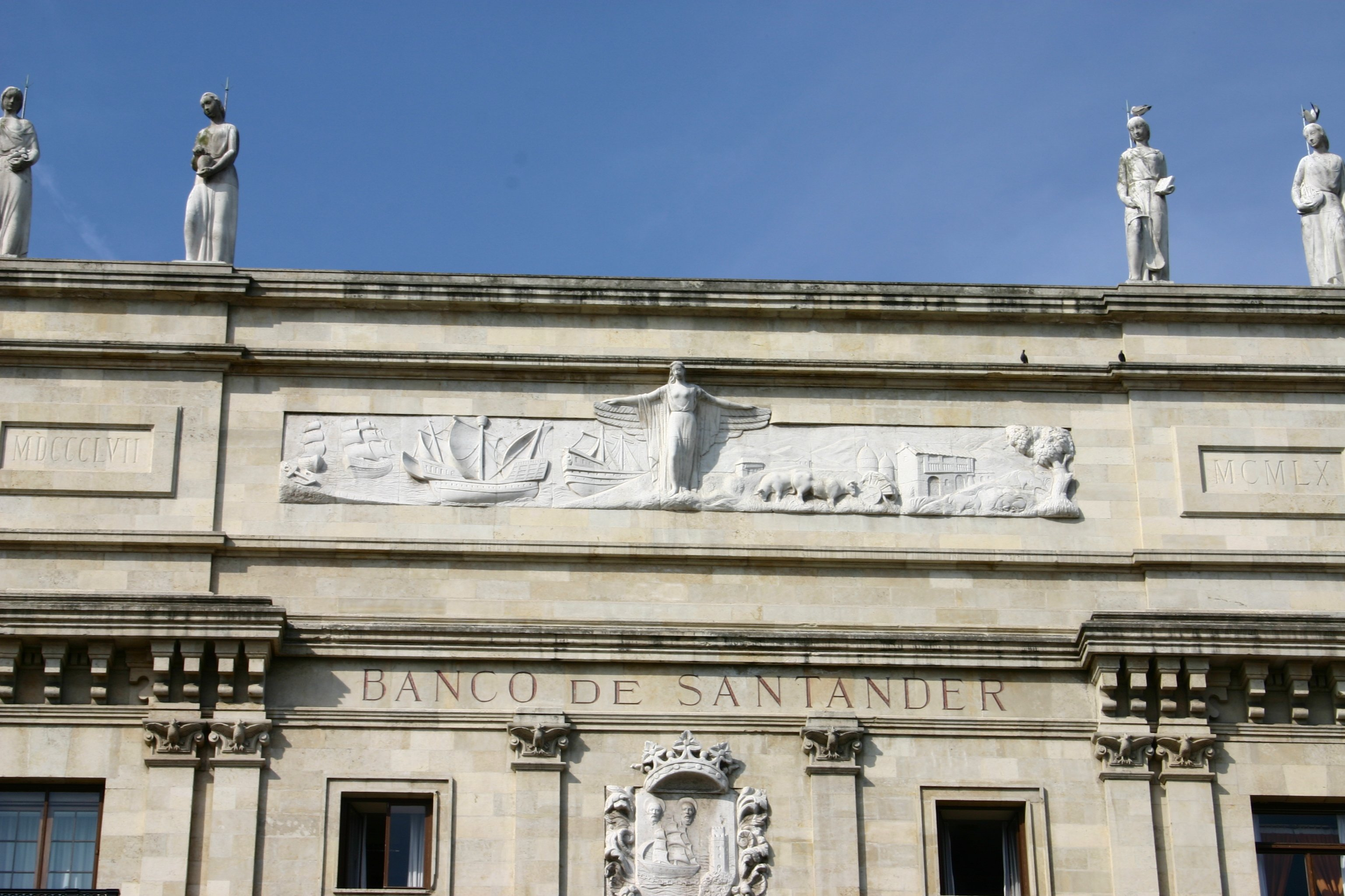 Detalle de la fachada del Banco Santander.